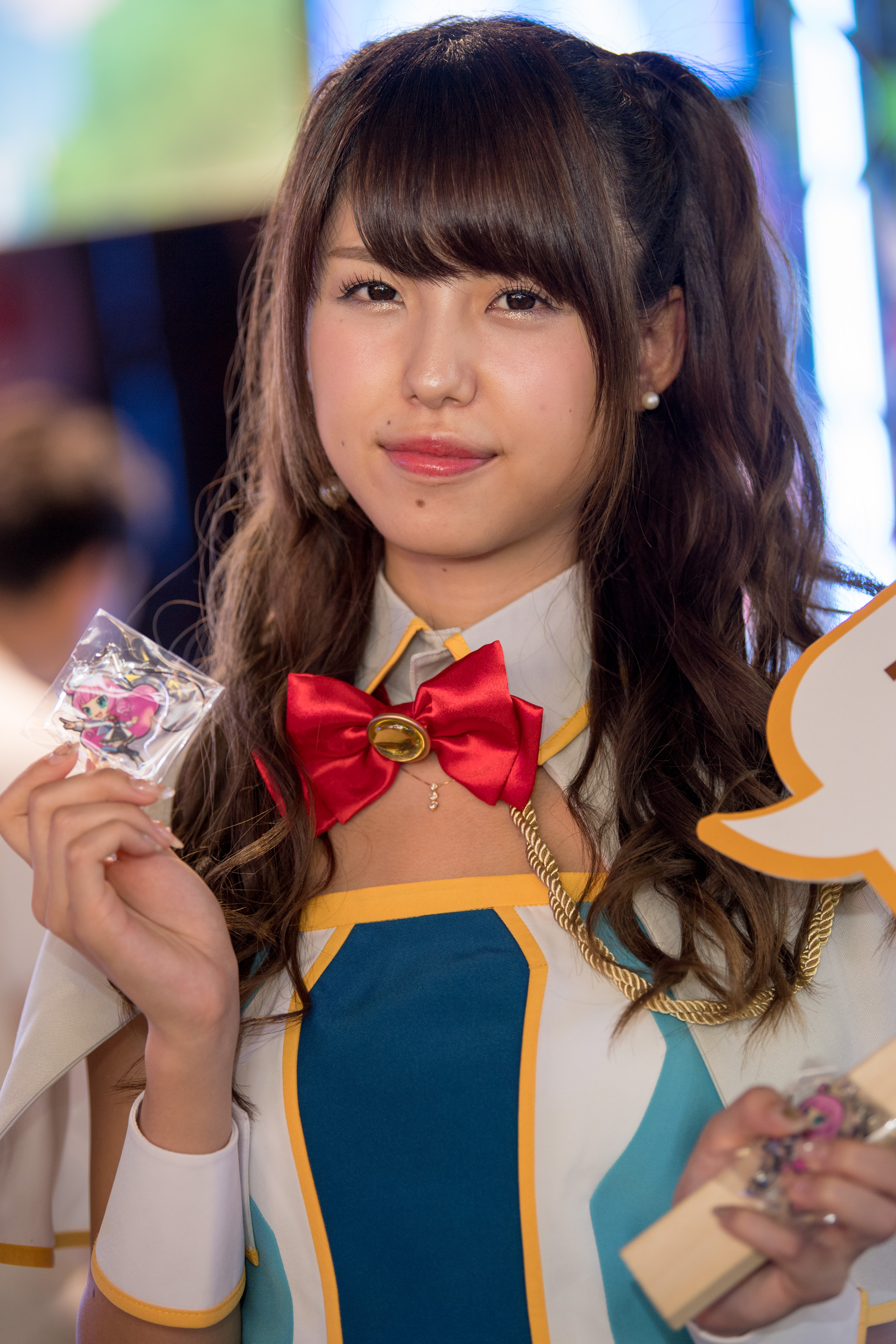 20170922-DSC_2074